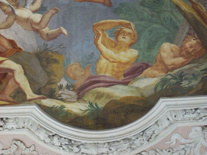 detail frescomedium QS:P186,Q25631150